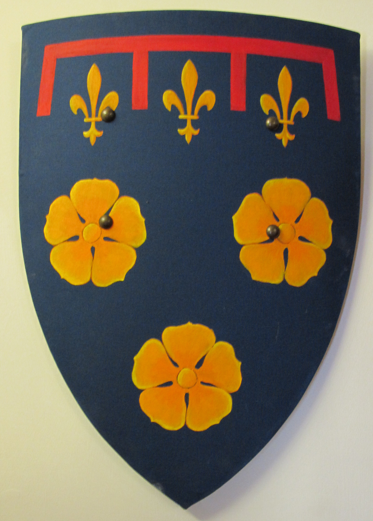 Casa di dante, fi, stemma brunetto latini